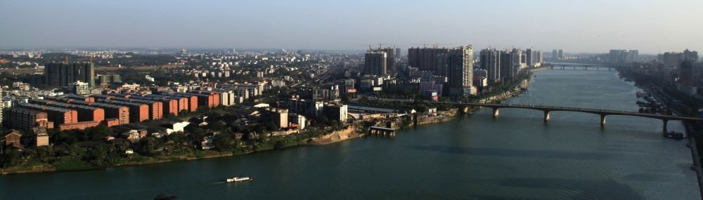 湘江一畔的